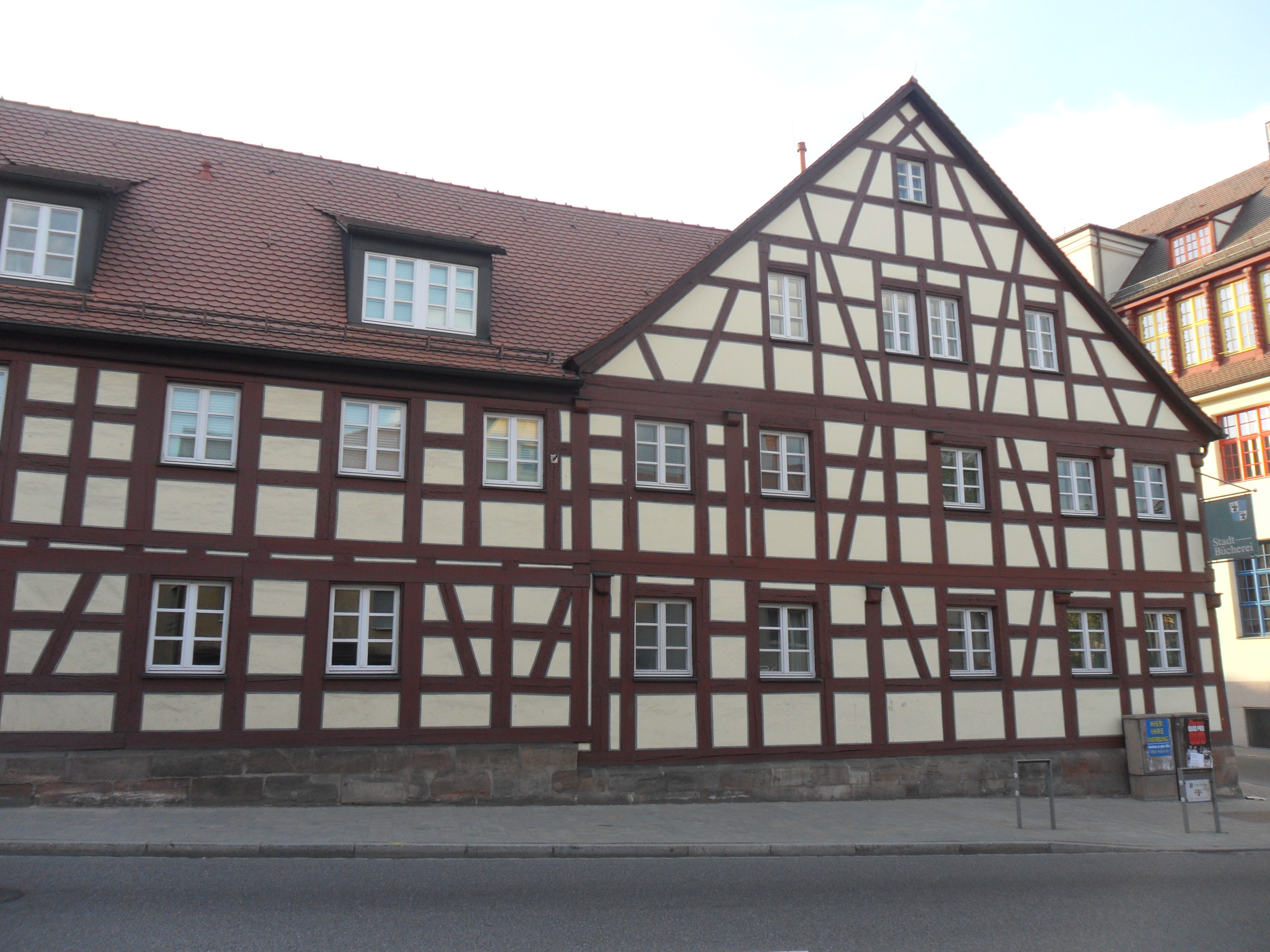 Ehemaliges Gasthaus „Scharfes Eck“ Mühlstraße 1 Stein 01